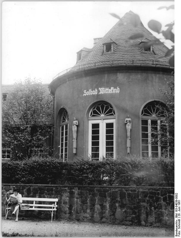 Halle, Solbad "Wittekind" Zentralbild Schmidt 20.6.1961 Halle an der Saale UBz: Das "Solbad Wittekind".